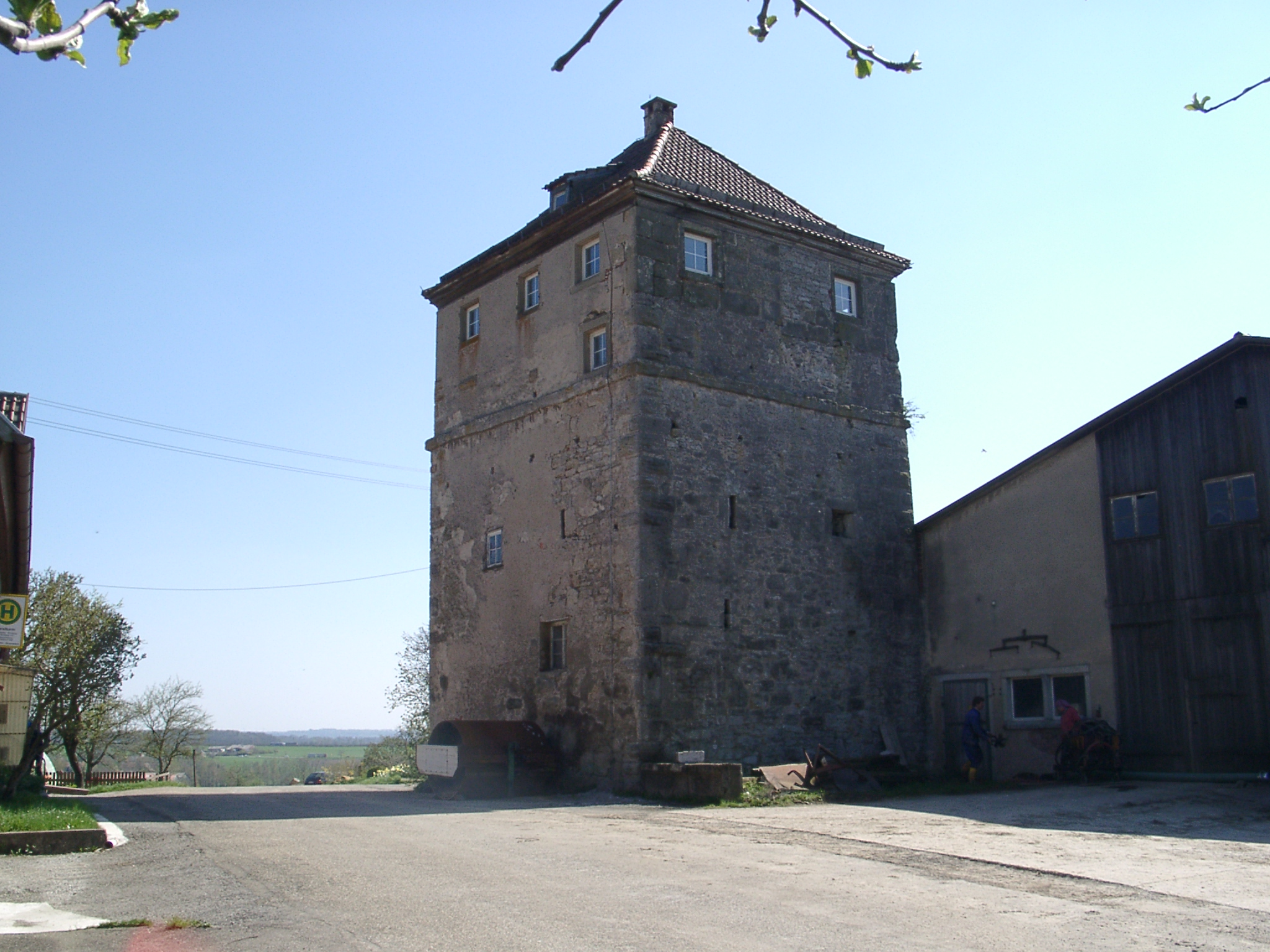 Landturm bei Hörlebach (Gemeinde Wolpertshausen)